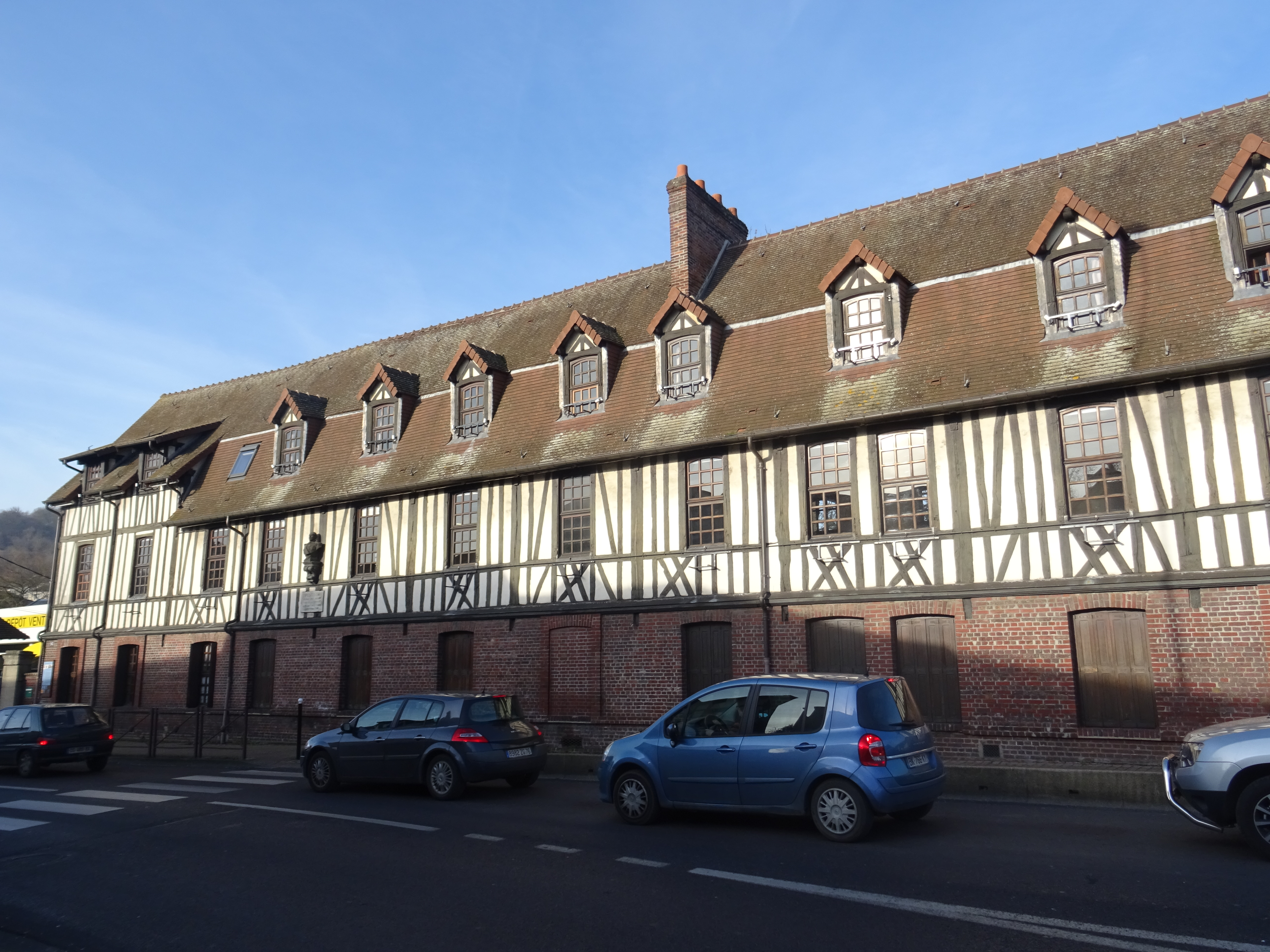 Maromme (Seine-Maritime, France) : Maison Pélissier